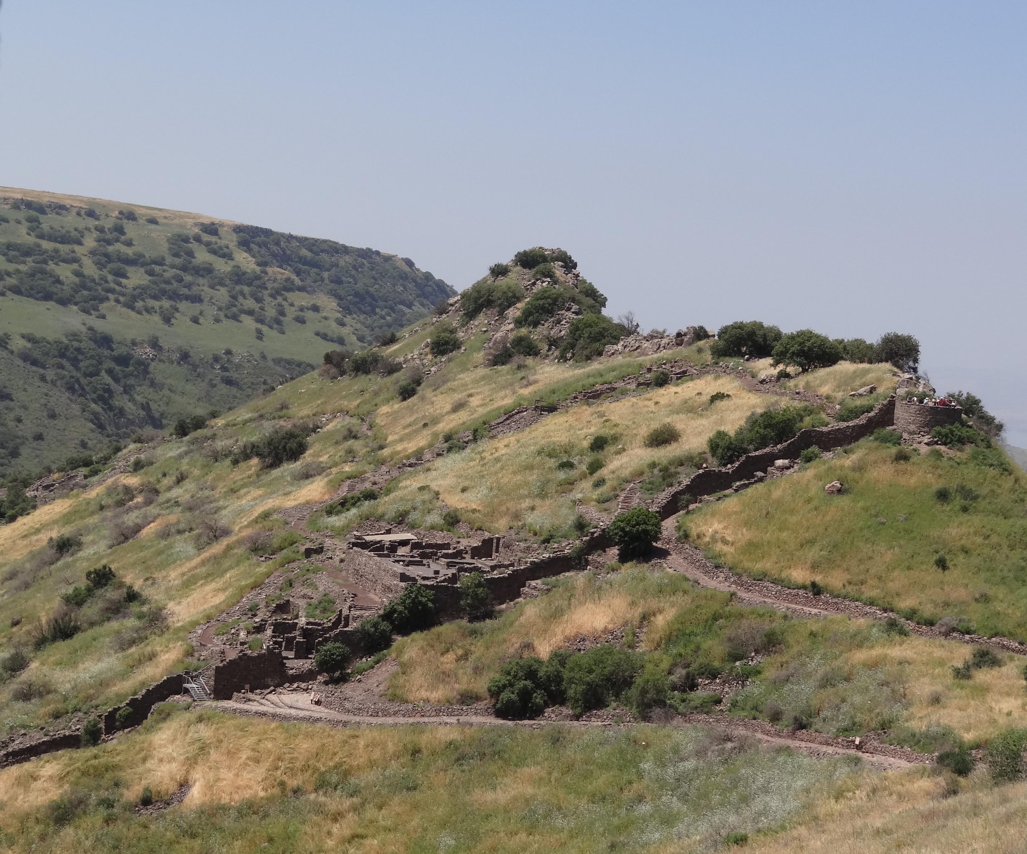 Gamla archaeology site אתר ארכאולוגי גמלא ברמת הגולן